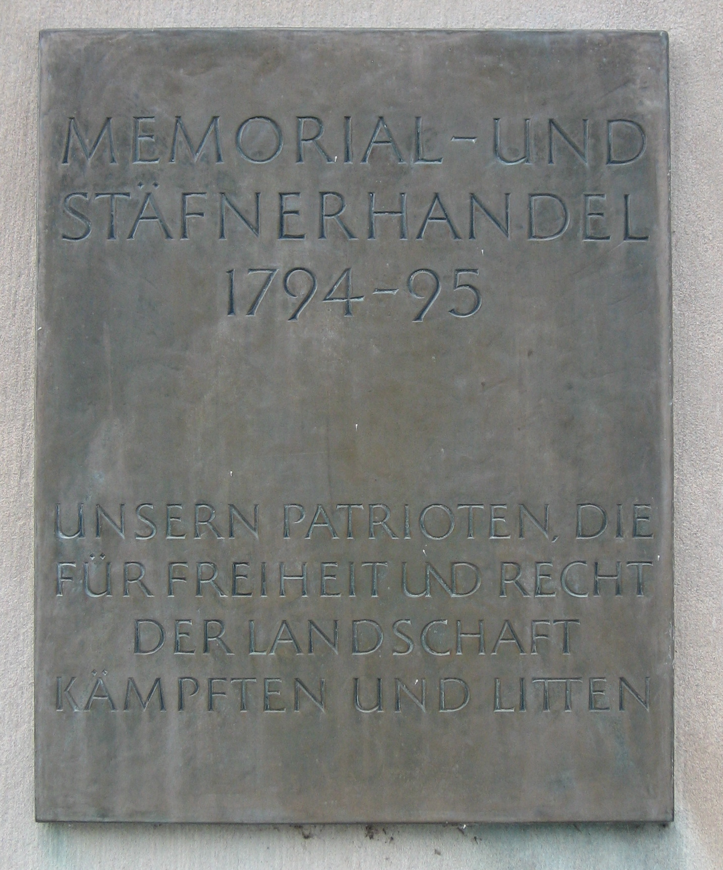 Erinnerungstafel an den Stäfner Handel